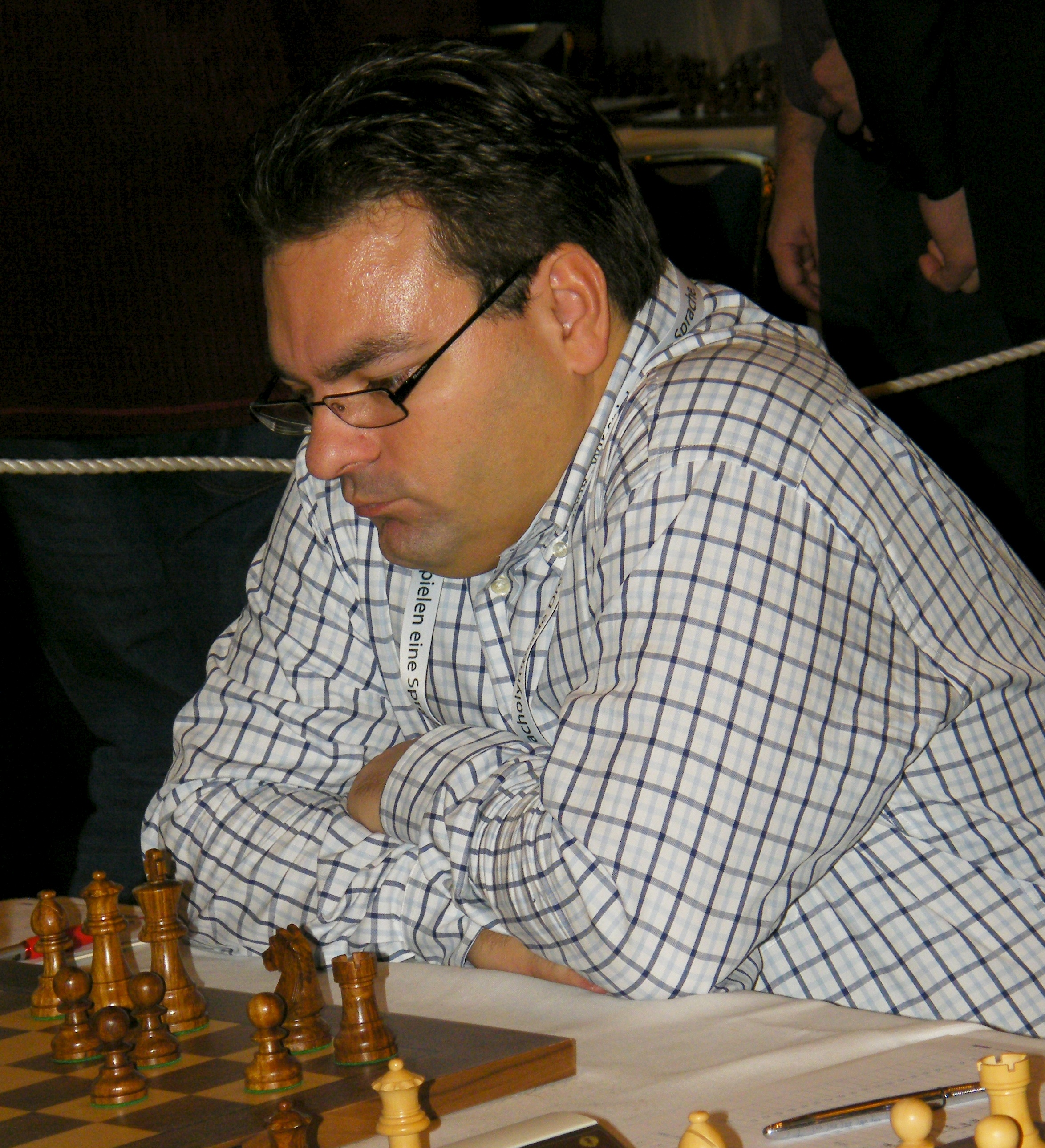 Slavko Cicak bei der 38. Schacholympiade in Dresden 2008